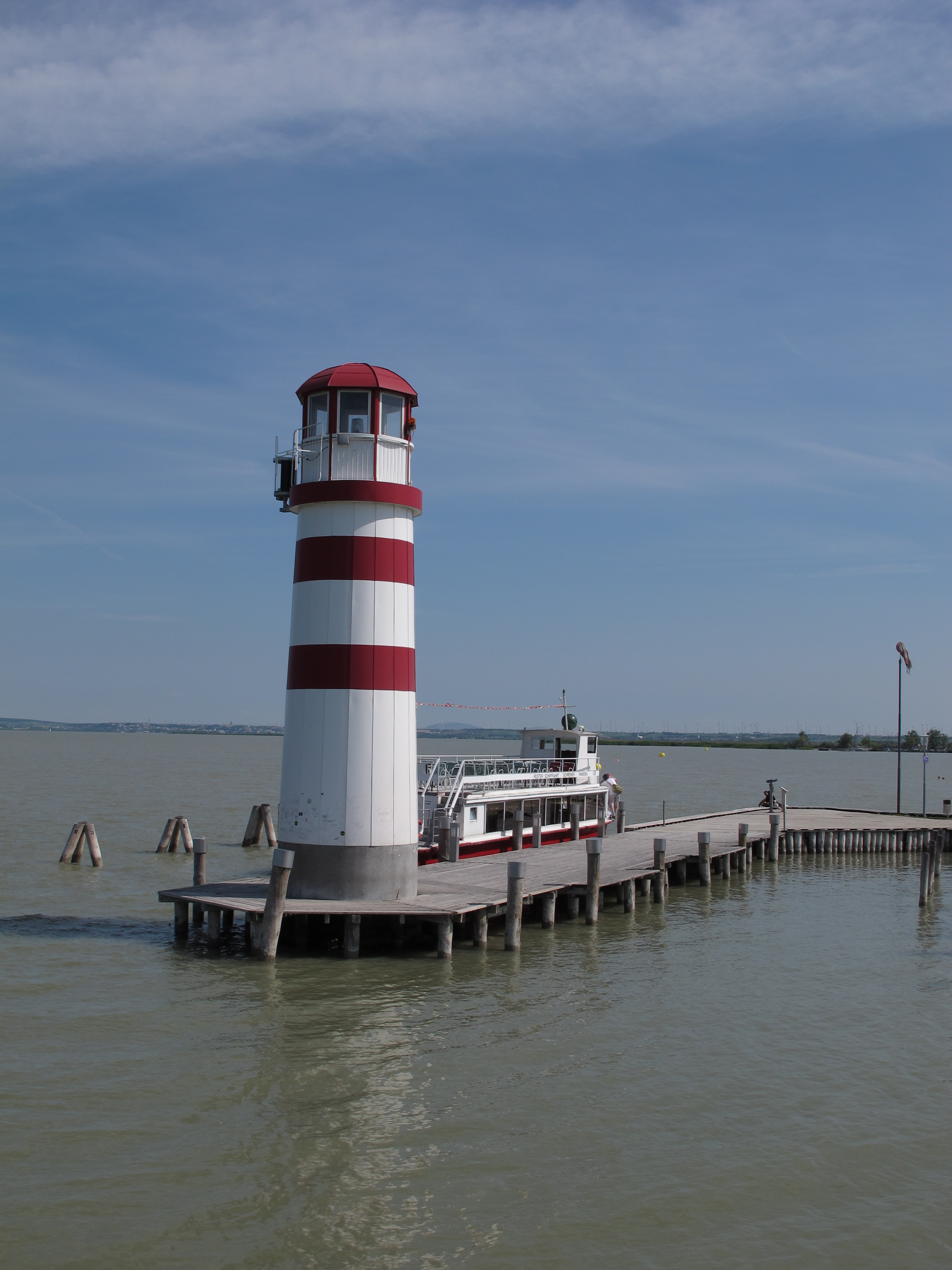 Leuchtturm Podersdorf Neusiedlersee